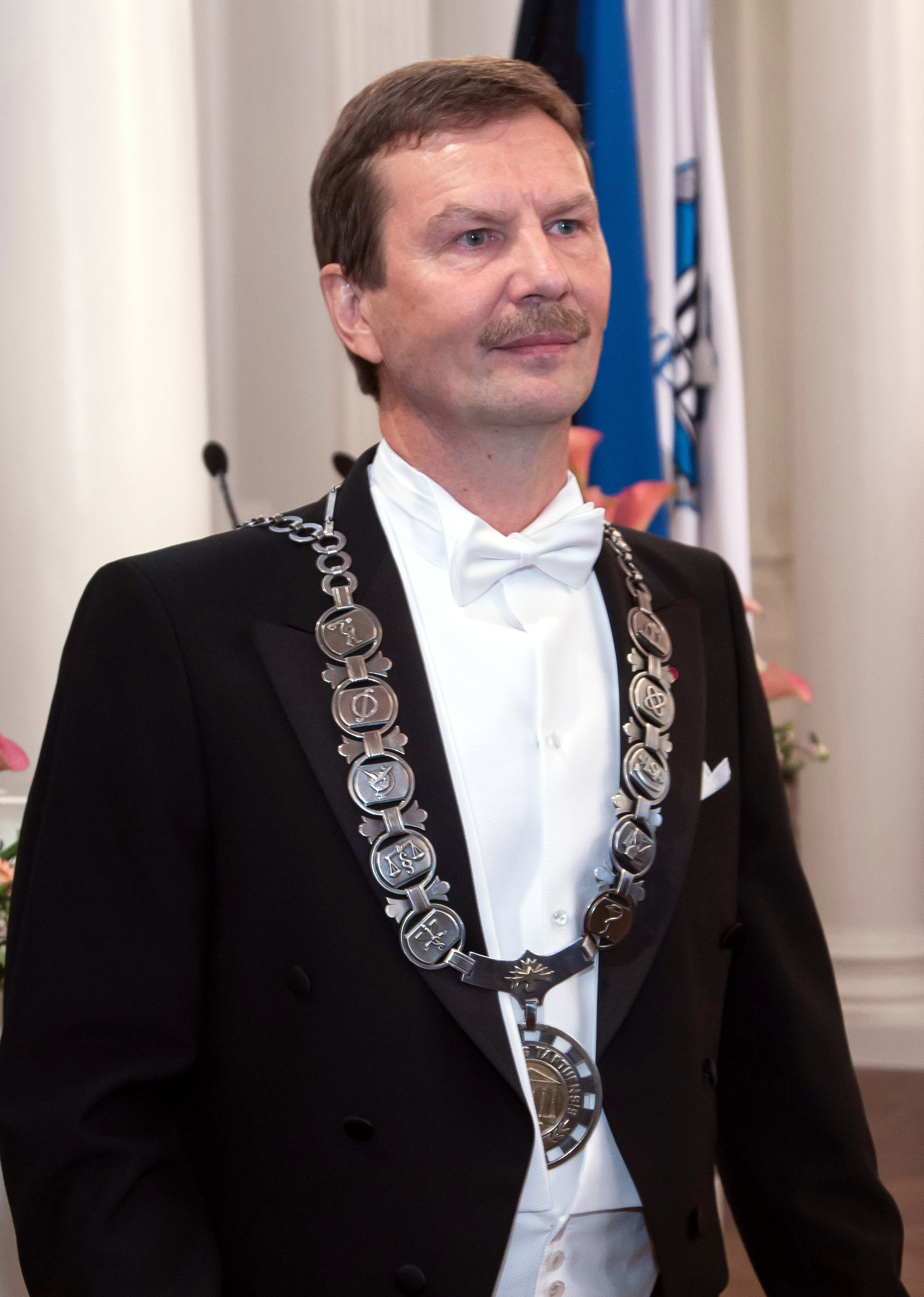 Tartu Ülikooli rektori professor Volli Kalmu inauguratsioon TÜ aulas 31. augustil 2012.